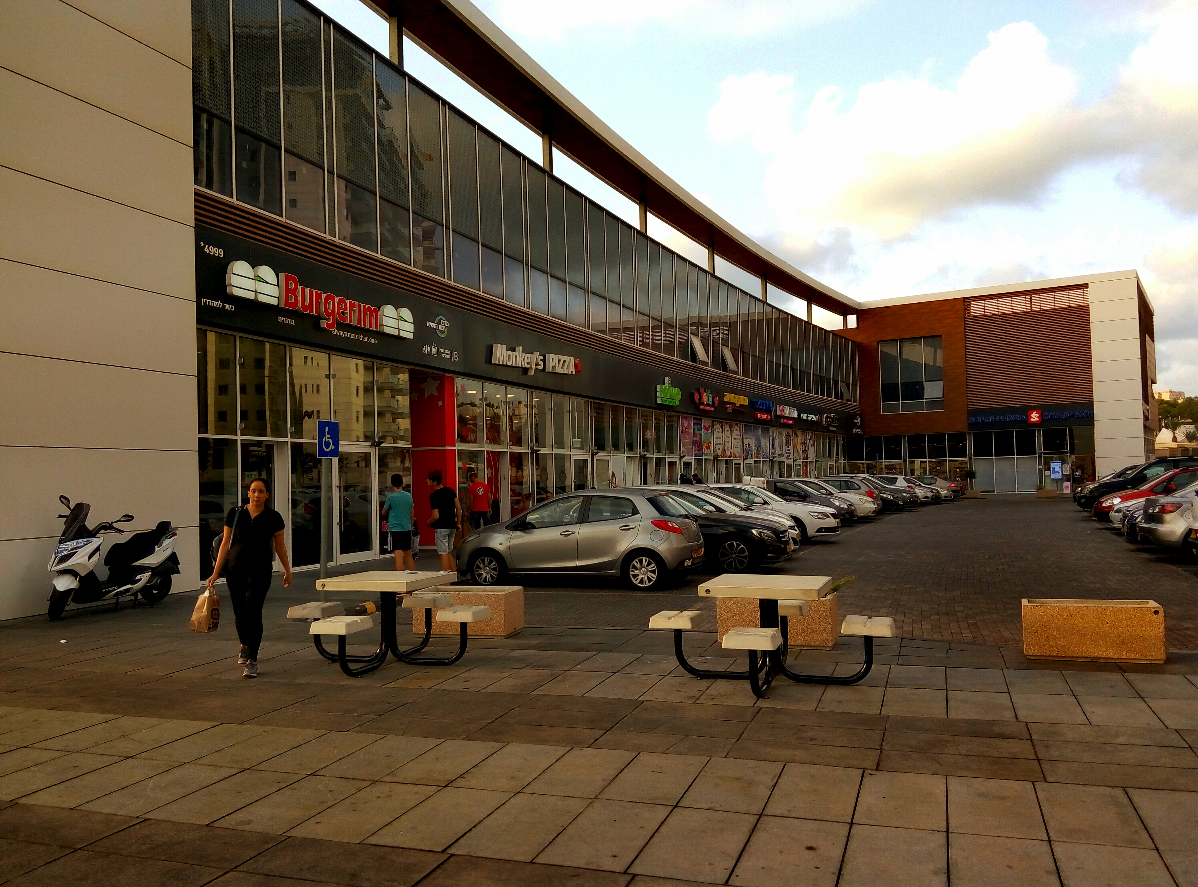 שכונת רמת הנשיא חיפה - המרכז המסחרי